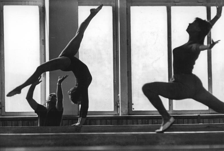 Birgit Radochla Zentralbild Kohls 27.8.1963 Mit 18 Jahren fünf Meistertitel - Birgit Radochla ist Neuwählerin. Fünf deutsche Meistertitel, den vierten Platz im Pferdsprung bei der Weltmeisterschaft 1962 in Prag sowie zahlreiche Siege in schweren internationalen Konkurrenzen - das weist die Statistik über eine Turnerin aus, die erst 18 Jahre alt ist und noch lange nicht auf dem Gipfel ihres Leistungsvermögens steht. Birgit Radochla (SC Dynamo Berlin) hat sich innerhalb von zwei Jahren an die Spitze der deutschen Turnerinnen gesetzt, und erst vor wenigen Tagen kehrte sie aus Budapest mit frischem internationalem Lorbeer zurück. In wenigen Wochen tritt Birgit Radochla nun zum ersten Mal an die Wahlurne. "Die Interessen aller Sportler liegen in unserem Staat in guten Händen. Ich verdanke meinen Aufstieg nicht nur der großzügigen Förderung, die der Sport in der DDR genießt. Doch wichtiger ist, daß sich unsere Regierung immer wieder unermüdlich für die Erhaltung des Friedens einsetzt, daß ich mich weiter im friedlichen Wettkampf mit meinen Sportfreundinnen in allen Ländern messen kann", sagte Birgit Radochla. (Näheres siehe ADN-Meldung Nr. 600 - 603 vom 27.8.63) UBz: Beim Training am Schwebebalken: Hilfestellung für Birgit (links) durch Trainer Herbert Hoffmann.